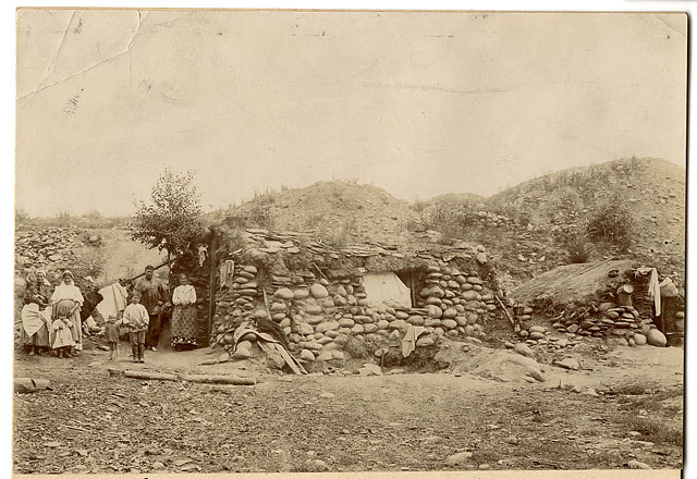 Siberia. Minusinsk.Gold rush